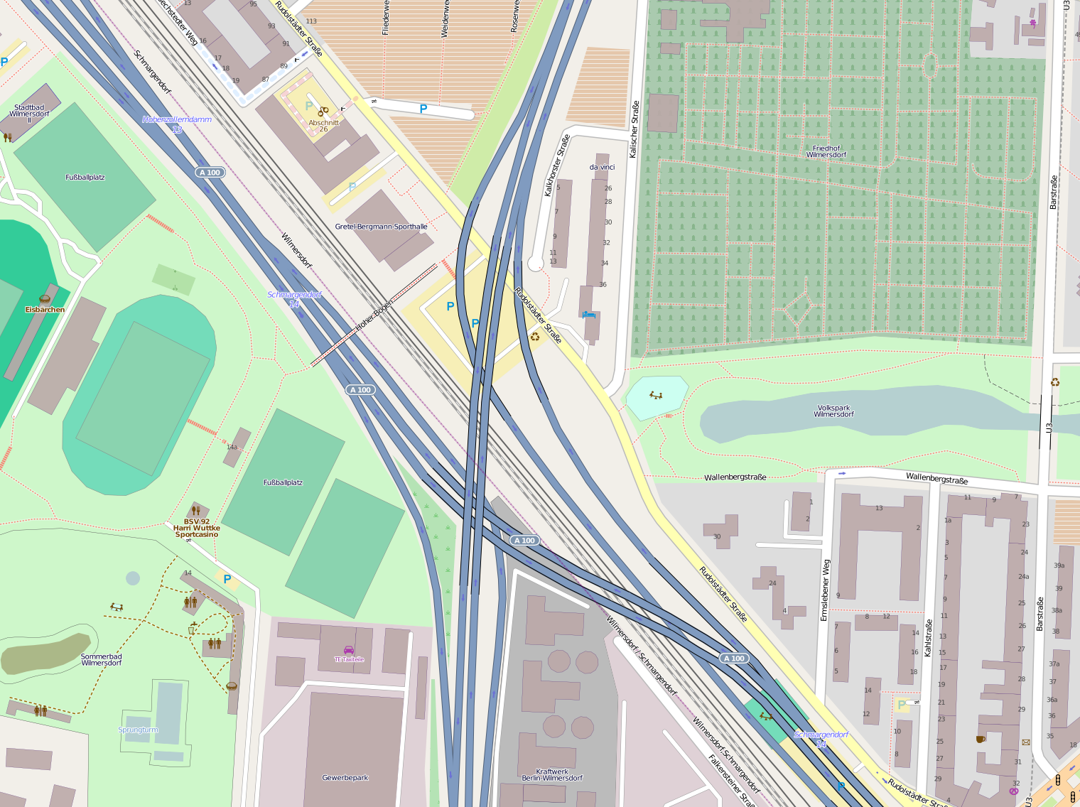 Lage des Autobahnkreuzes Wilmersdorf (A100) in Berlin.